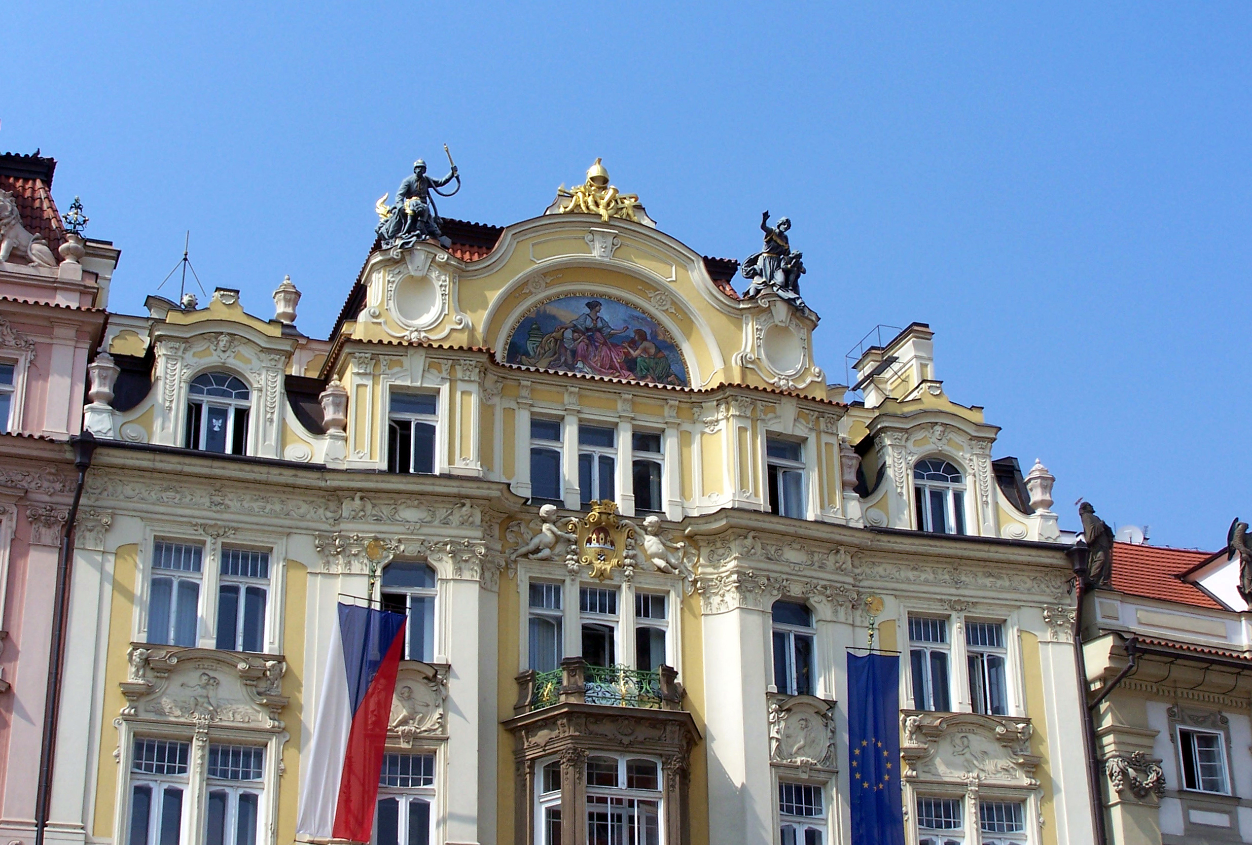 Pražská městská pojišťovna na Staroměstském náměstí. Vlevo socha "Hasič" a vpravo socha "Volání na poplach" od Bohuslava Schnircha